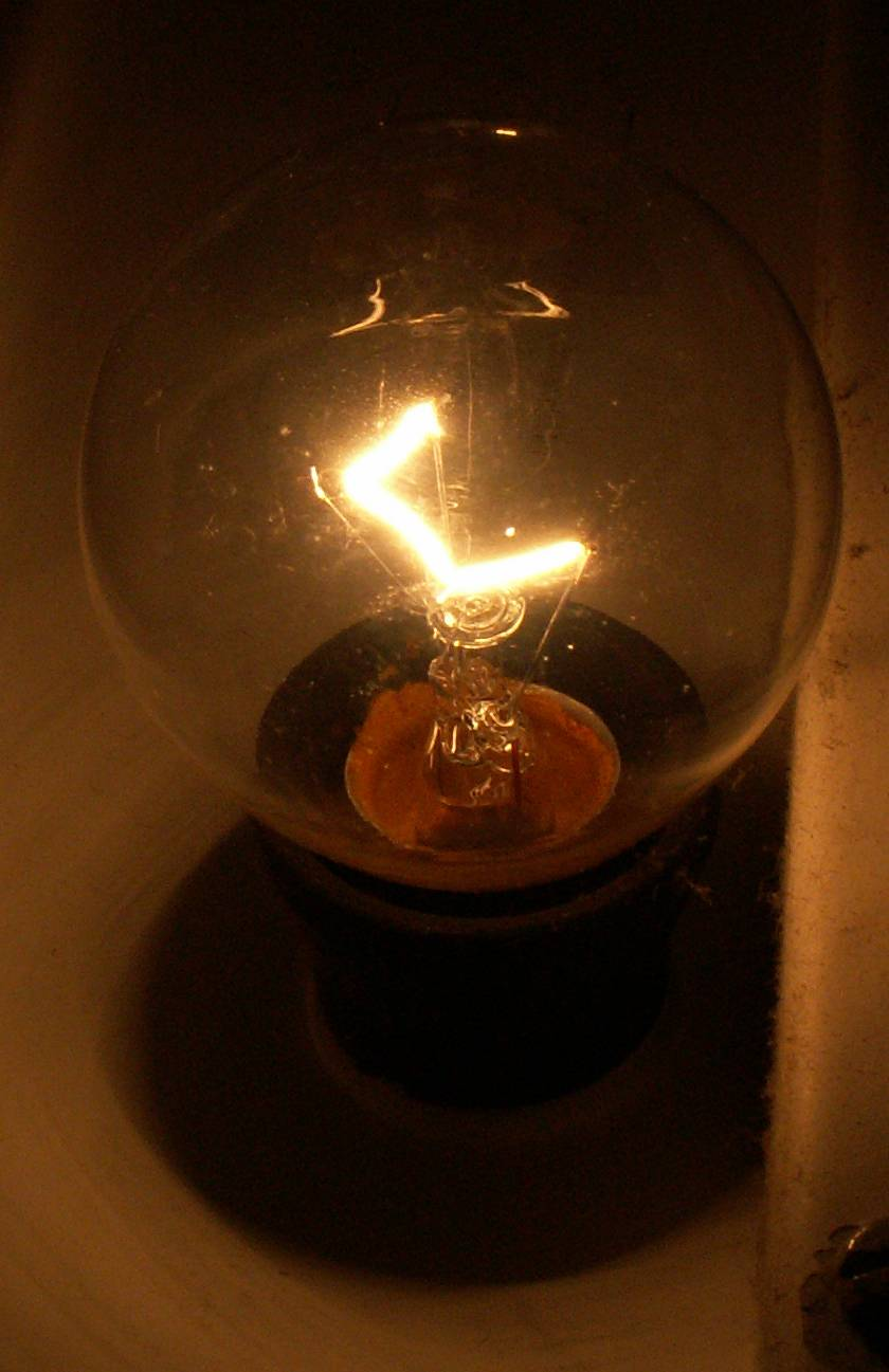 Foto einer Glühlampe, E14-40W klar von Osram.